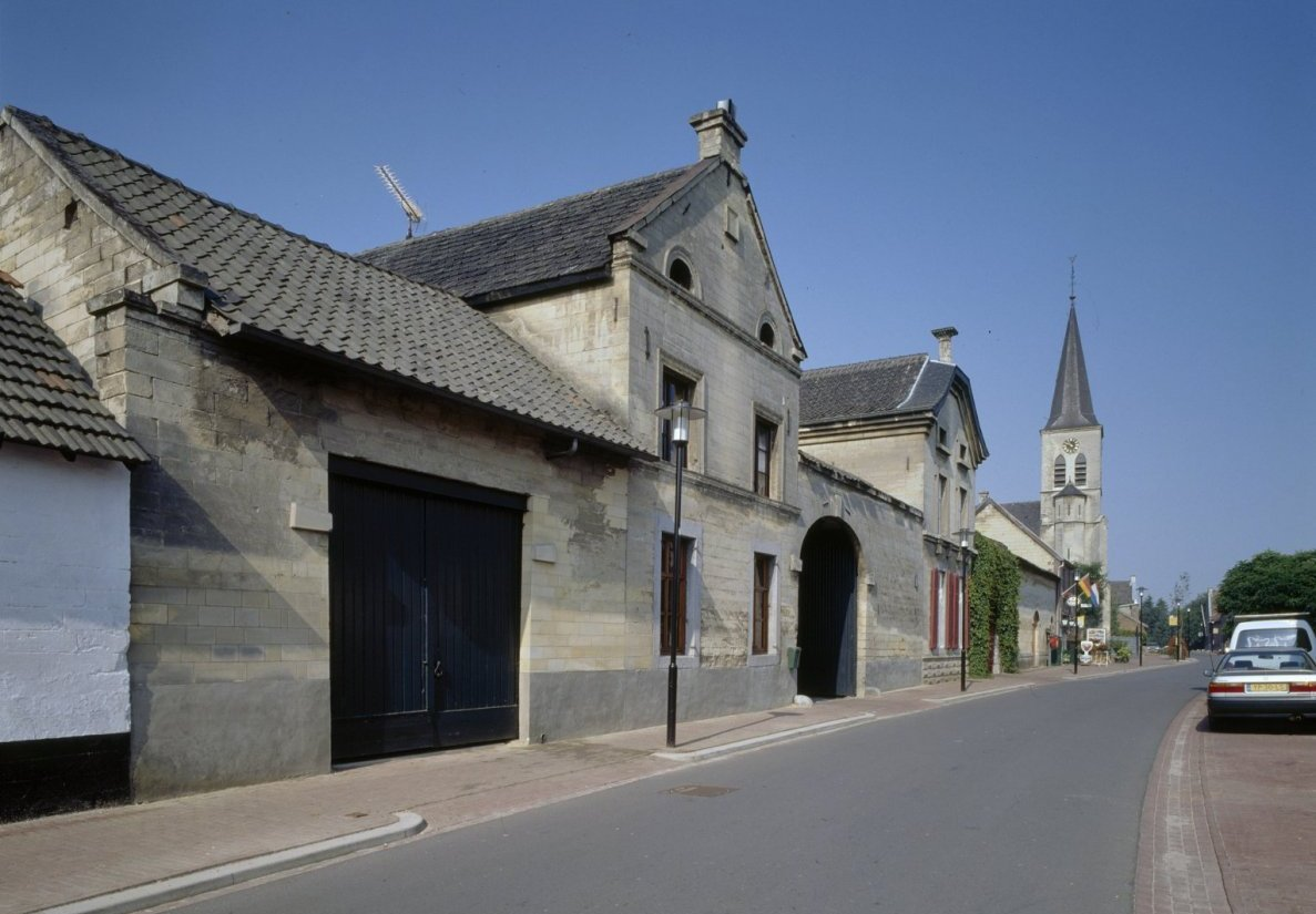 Sint Barbarakerk: Overzicht voorgevels met zicht op kerktoren (opmerking: Gefotografeerd voor Monumenten In Nederland Limburg)